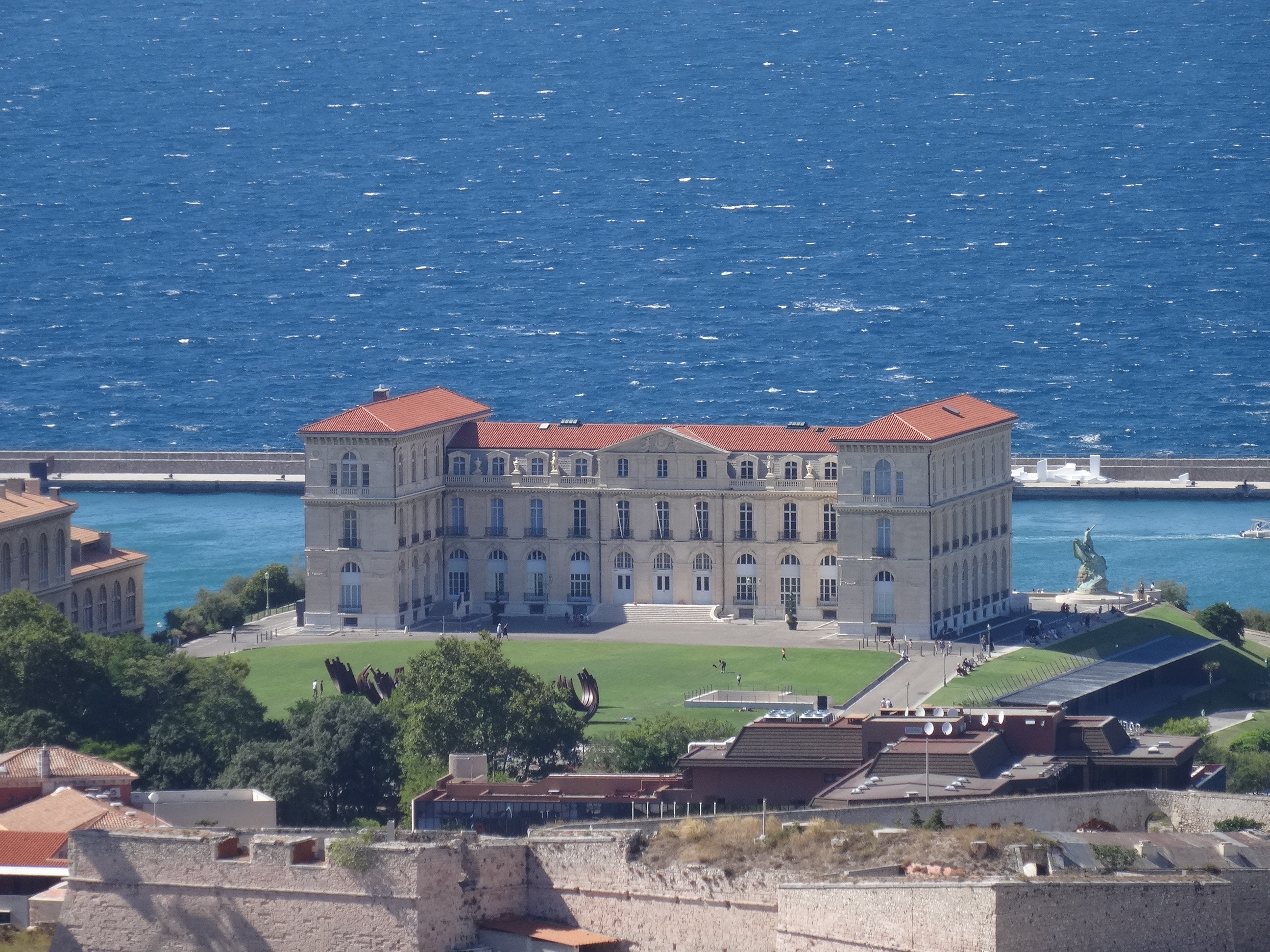 Le Palais du Pharo vu de ND de la Garde